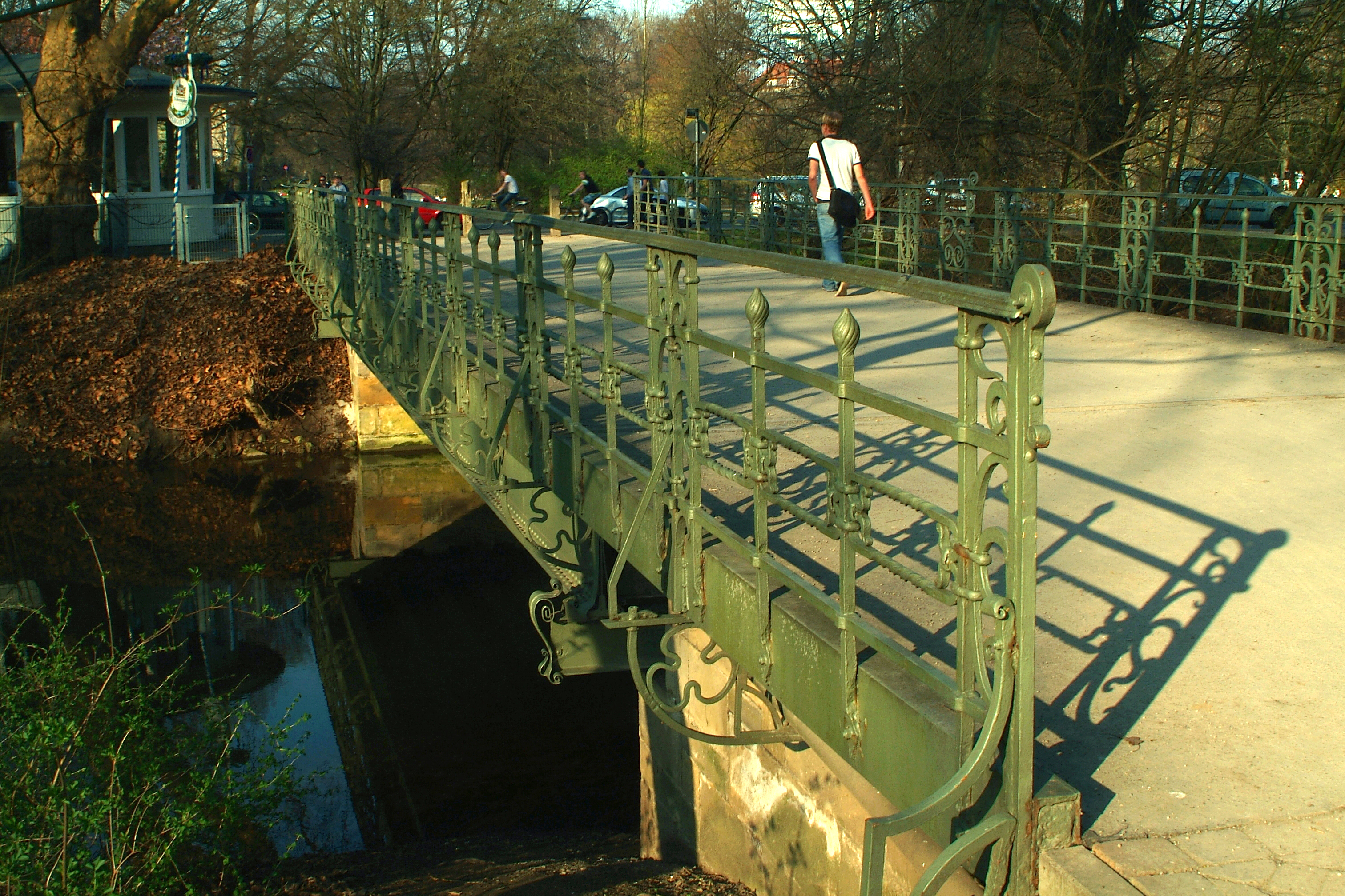 Blick von der Ecke des Spazierweges Bella Vista über die Brücke Richtung Maschpark